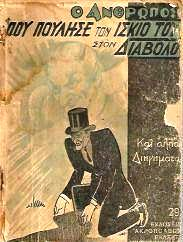 Αλληγορικό, λογοτεχνικό έργο.